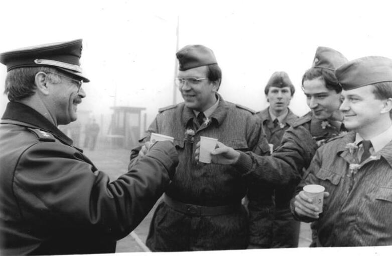 ADN-ZB-Settnik-14.11.89-Berlin: Als weitere Grenzübergangsstelle zwischen der DDR-Hauptstadt und Berlin (West) wurde im Stadtbezirk Treptow der Übergang nach Rudow in der Stubenrauchstraße eröffnet. Möglich wurde dadurch dieses erste gemeinsame Kaffeetrinken von DDR-Grenzsoldaten und Westberliner Polizisten.